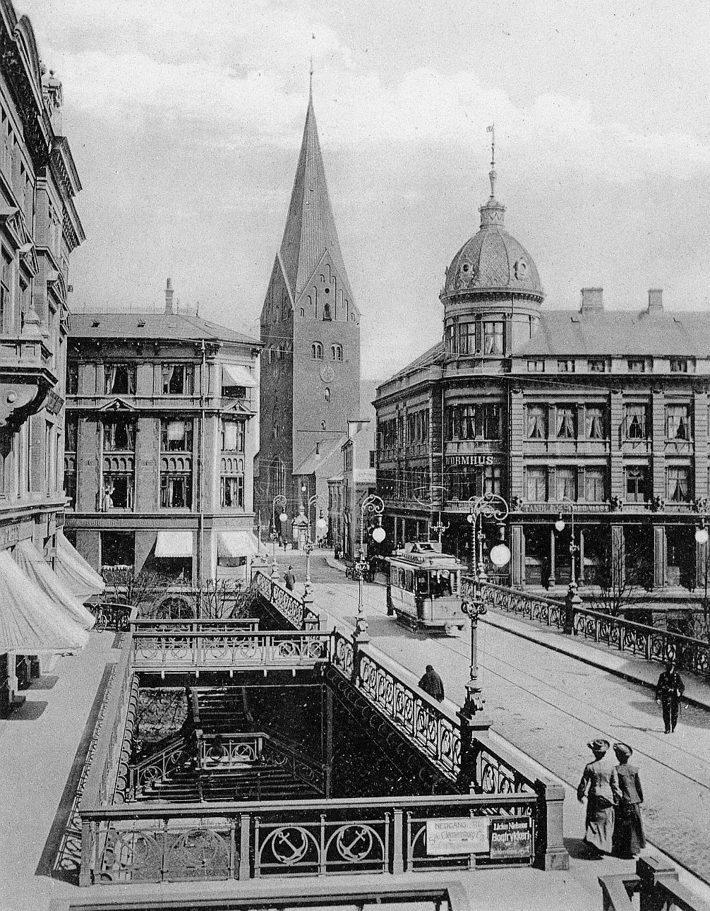 Skt. Clemens Bro, Aarhus, Denmark, 1905